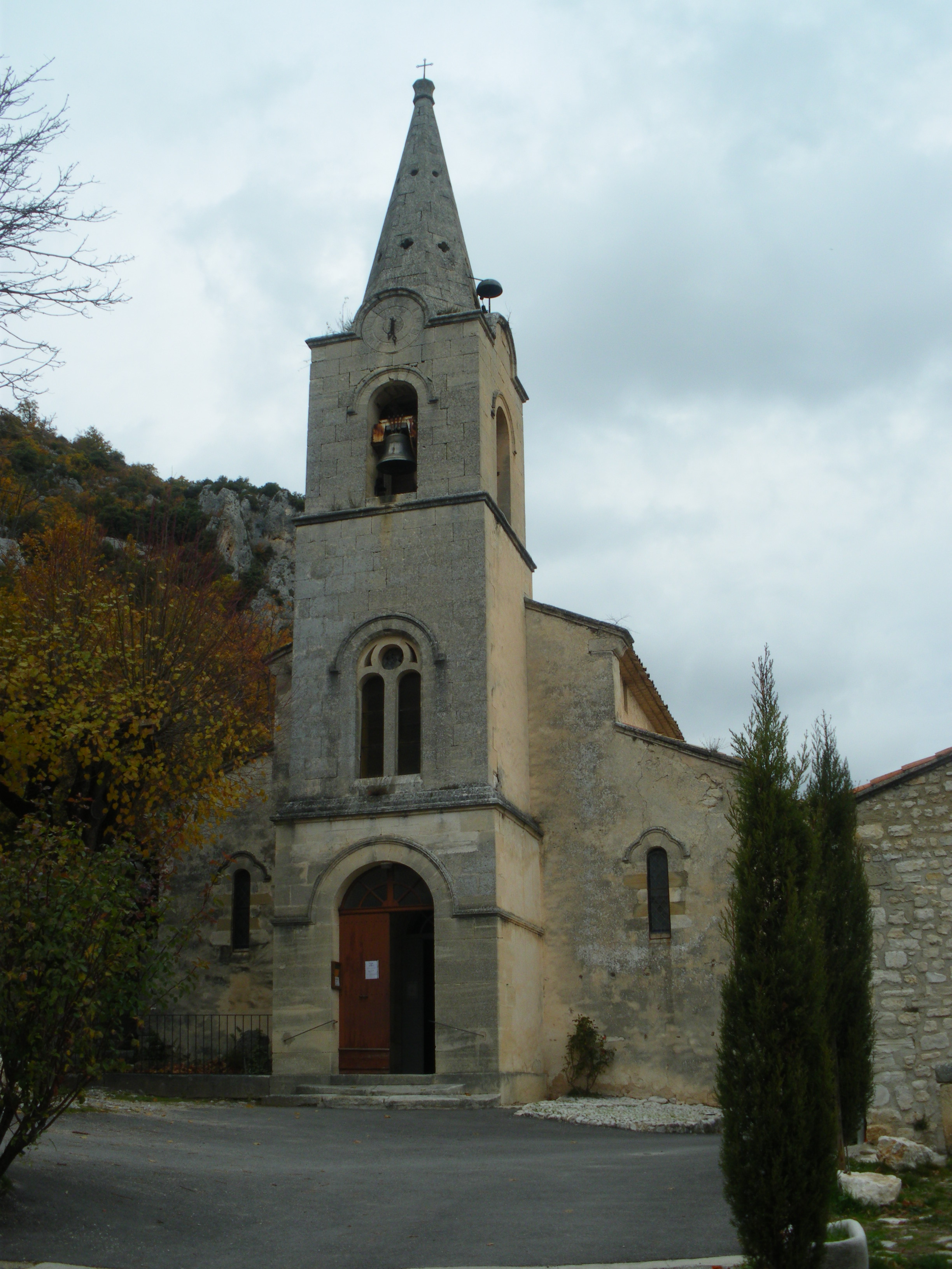 église de Monieux, Vaucluse, France